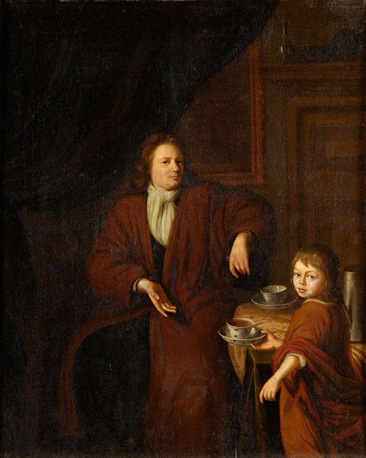 Knabe bringt seinem Vater eine Tasse Kaffee